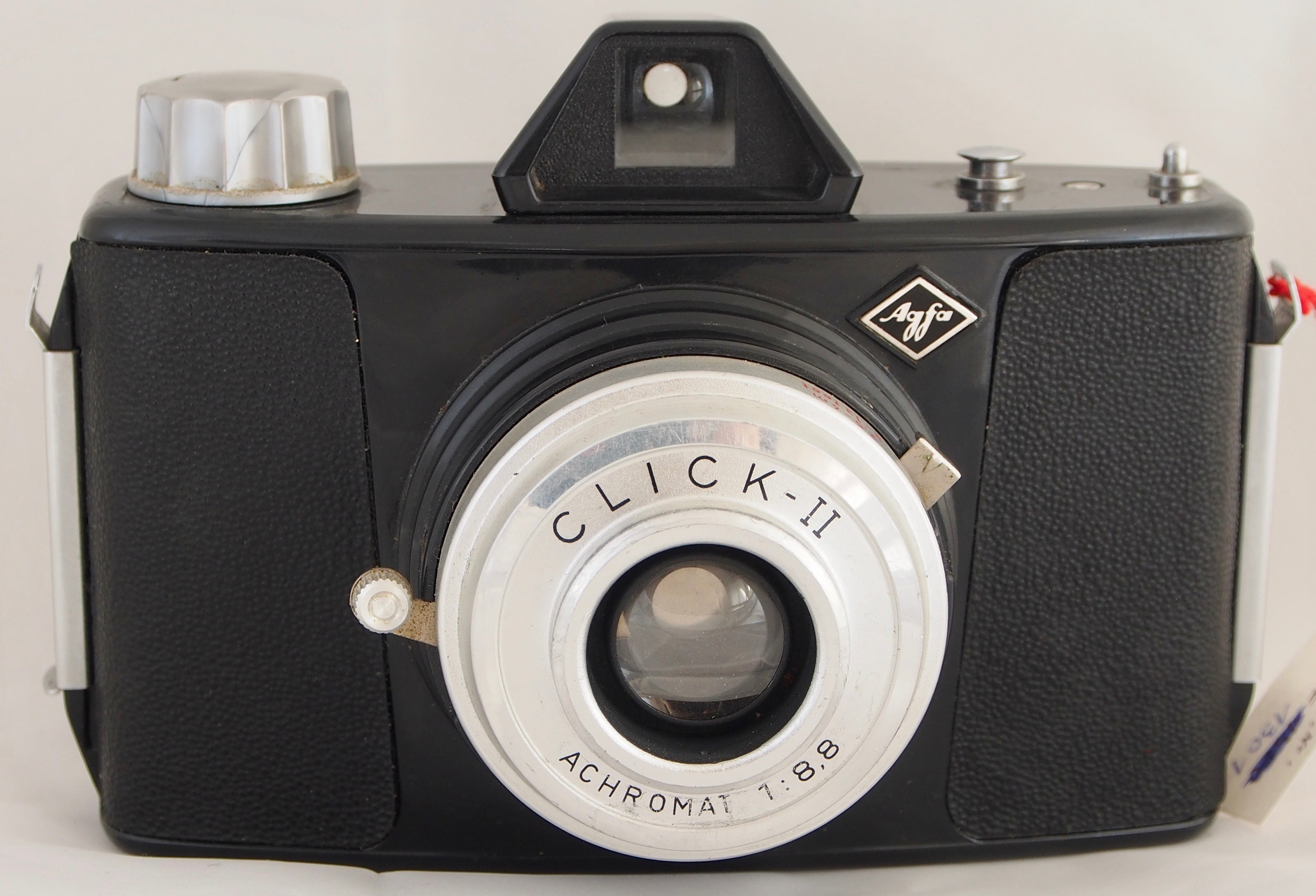 Click II Kadl# 1301